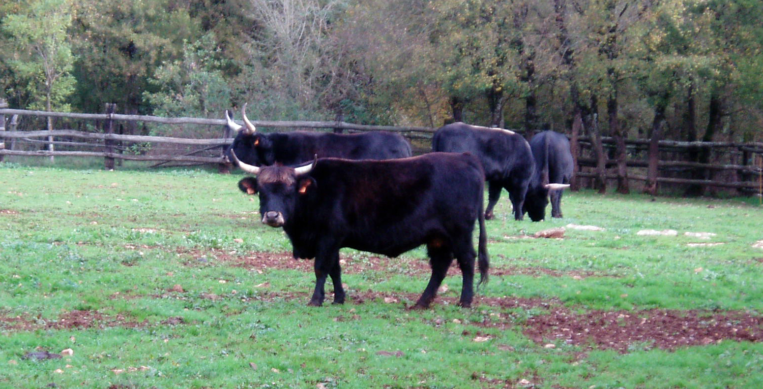 aurochs-reconstitués du Parc animalier de Gramat, France